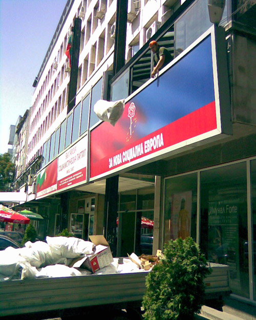 Позитано 20